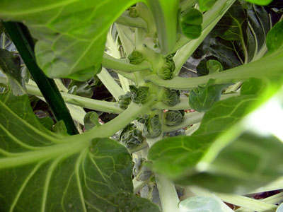 choux de bruxelles avant d'être ceuillis